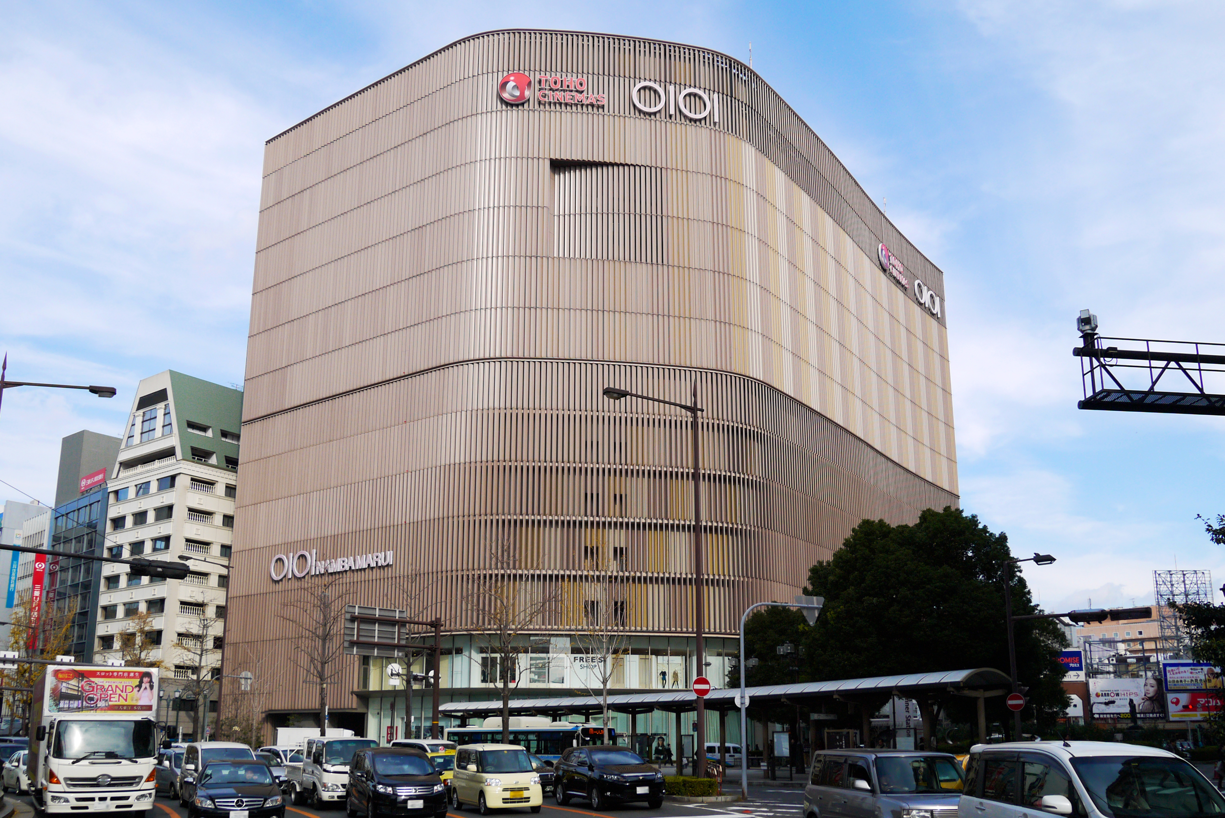 Namba Marui (なんばマルイ), Osaka, Osaka prefecture, Japan